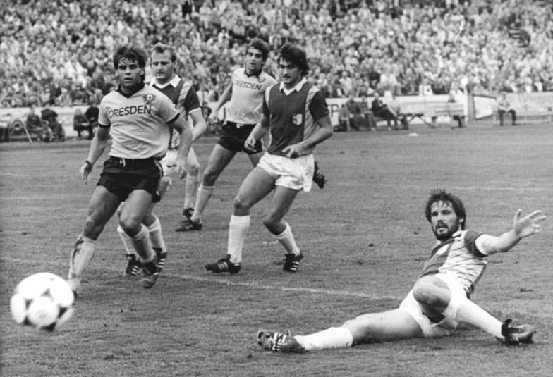 ADN-ZB-Häßler -23.8.86-wo- Dresden: Fußball-Oberliga- SG Dynamo Dresden - 1. FC Magdeburg 2:2- Der Magdeburger Spieler Dirk Stahmann (r.) konnte in dieser Spielszene den Ball vor dem Dresdner Spieler Ulf Kirsten (l.) abschlagen.